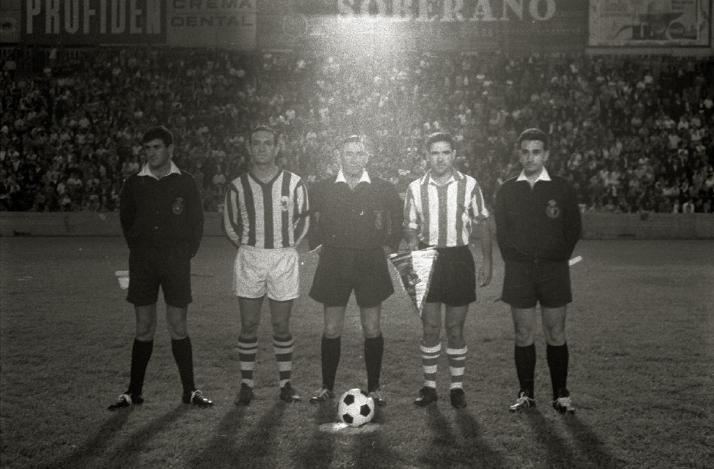 Título original: Partido de fútbol entre la Real Sociedad y el Atletic de Bilbao en el campo de Atotxa (4/5) Localización: San Sebastián (Guipúzcoa)